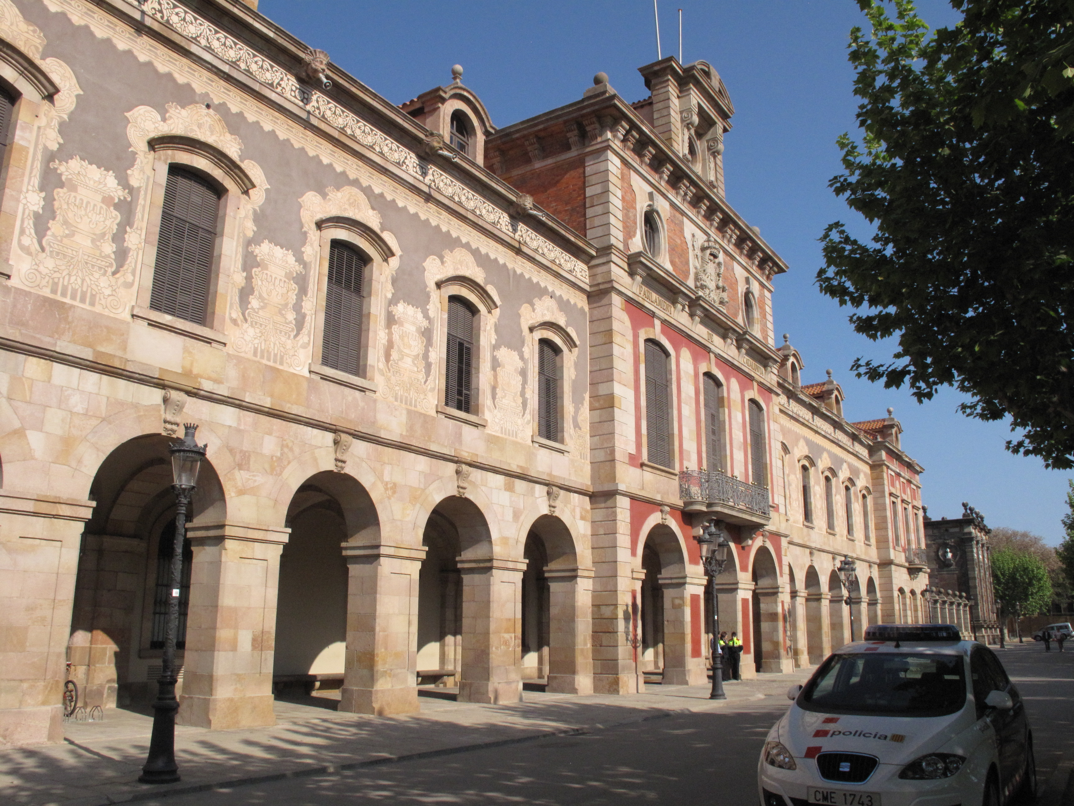 Parlament de Catalunya, al parc de la Ciutadella (Barcelona)